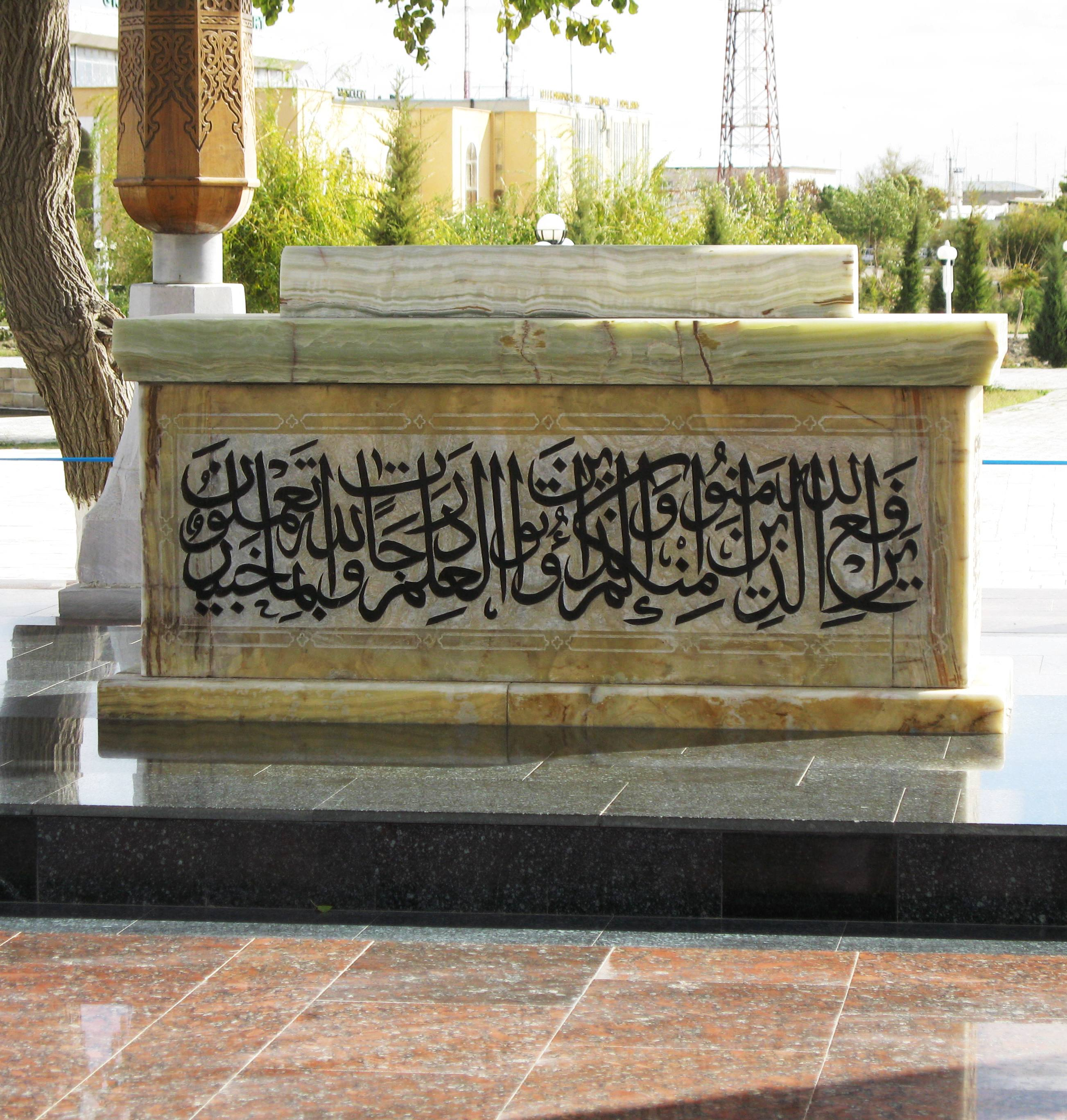 Татарча/tatarça: Габдулхалик Гуҗдуваниның кабере, ягъни мезәр ташы